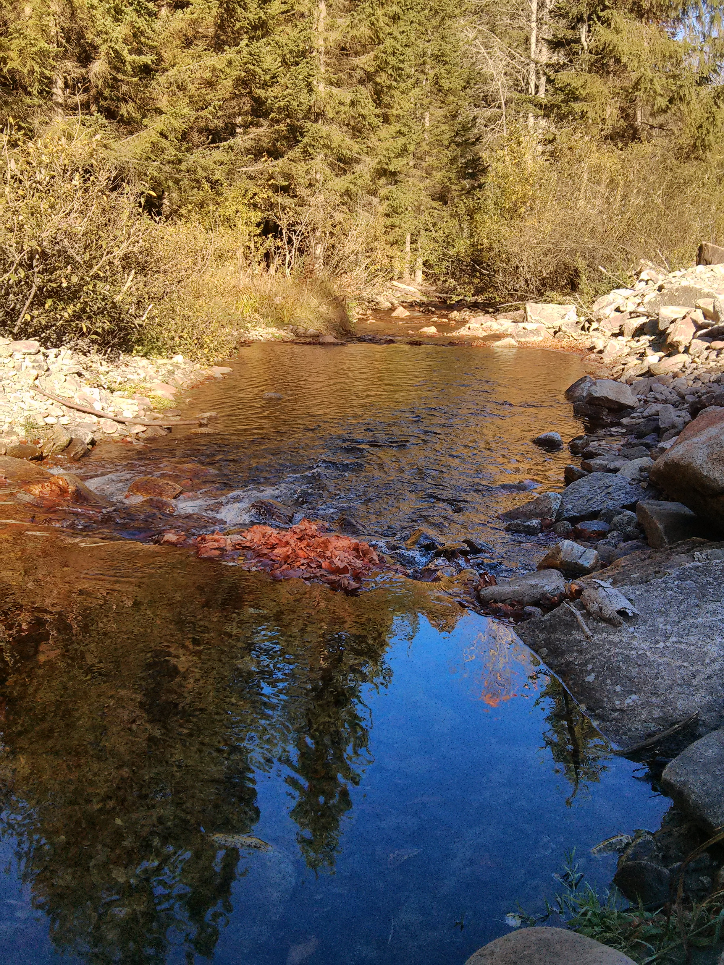 Piknik prostor nad Sumikom